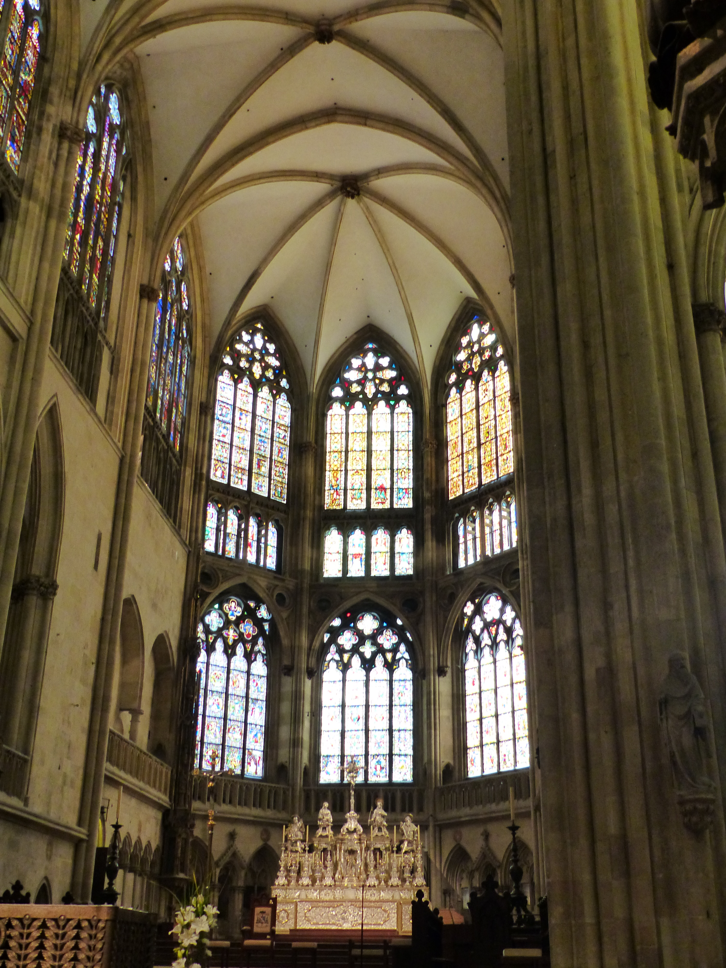 Regensburger DomThis is a photograph of an architectural monument.